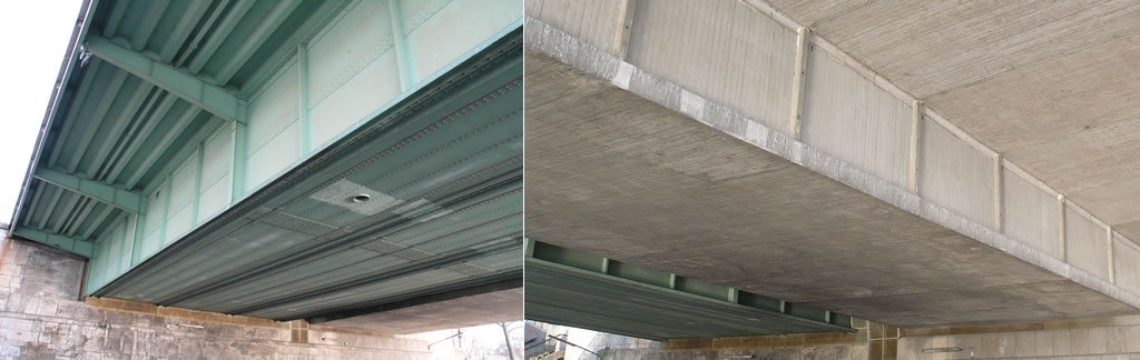 Die beiden unterschiedlichen Bauweisen der Deutzer Brücke in Köln (rechtsrheinisch)